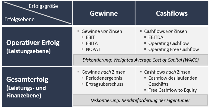 Erfolgsgrößen (Gewinne und Cashflows)